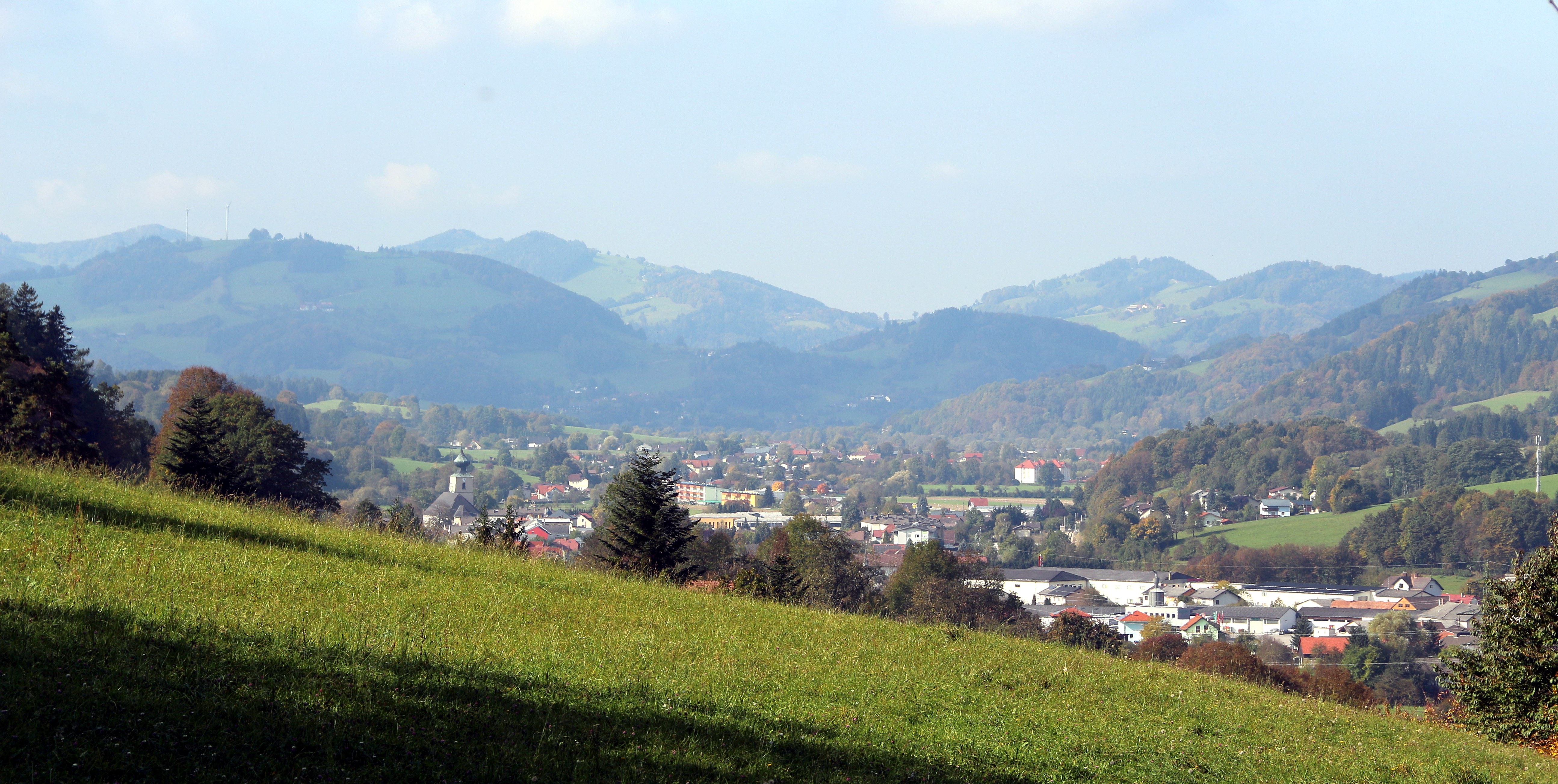 Ortsansicht von St. Veit an der Gölsen im Gölsental, Niederösterreich. Blickrichtung Nordwesten.